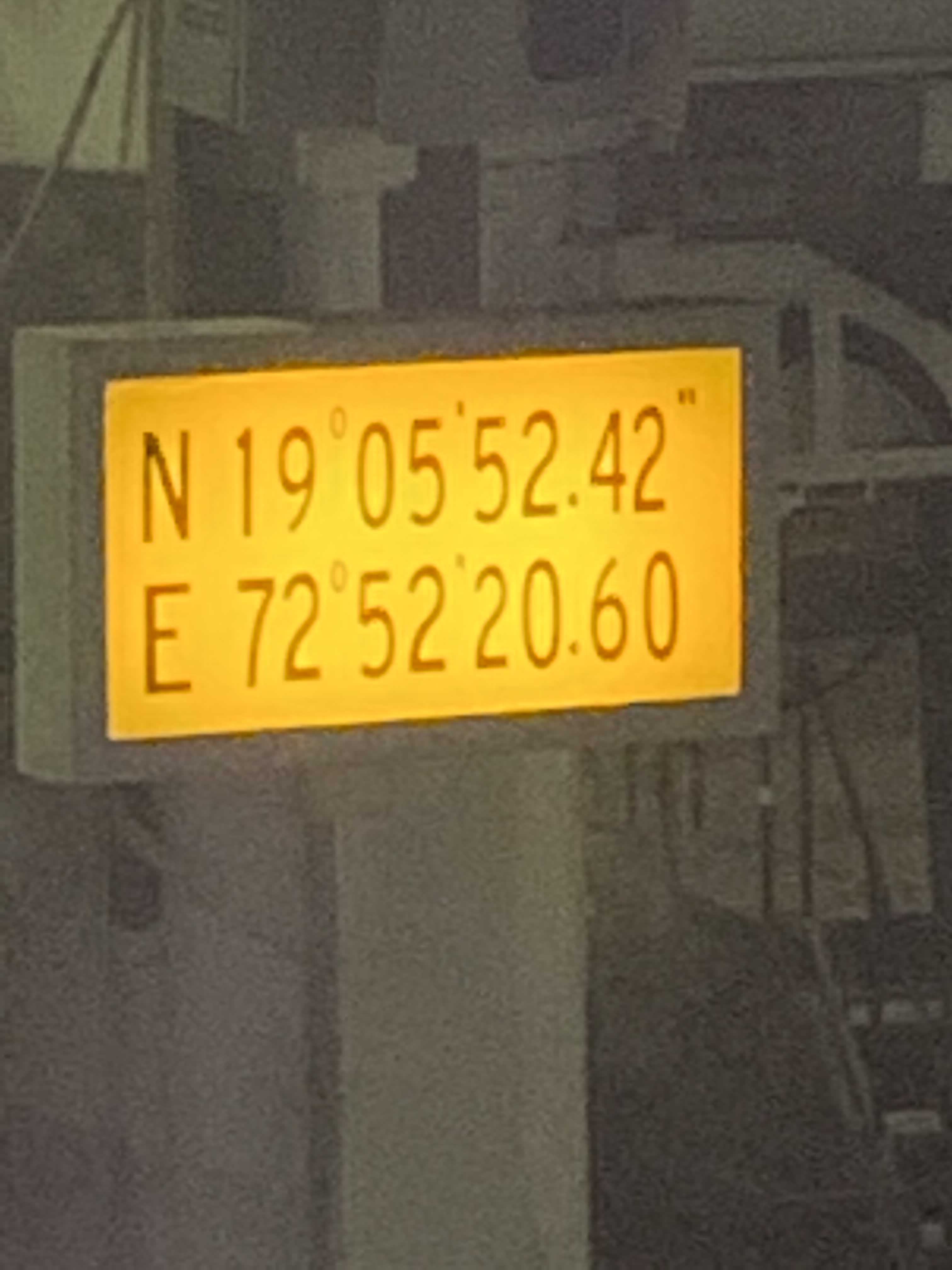 Bord met coördinaten bij gate 81 van terminal 2 van de luchthaven van Mumbai (BOM)